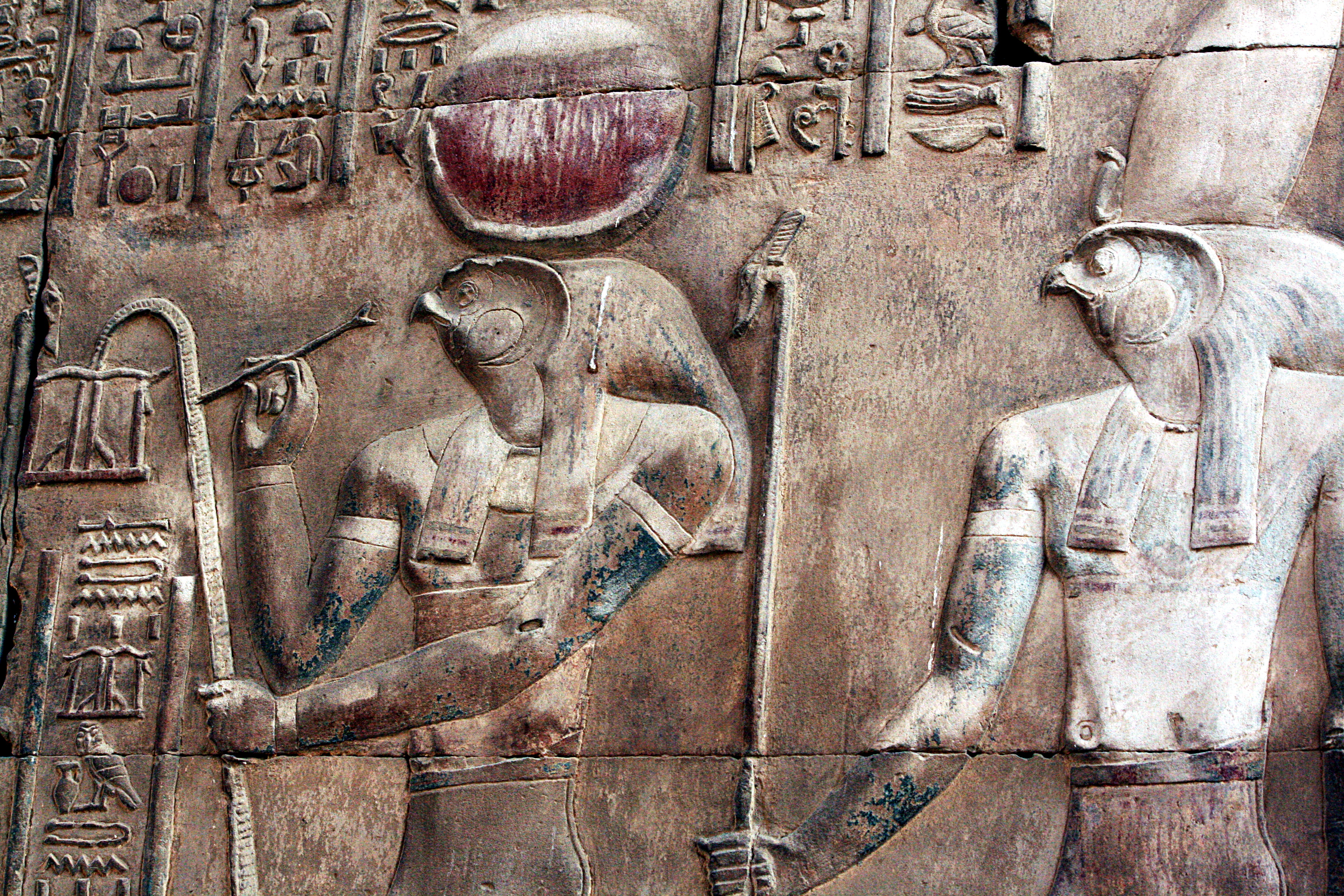 Tempel von Kom Ombo